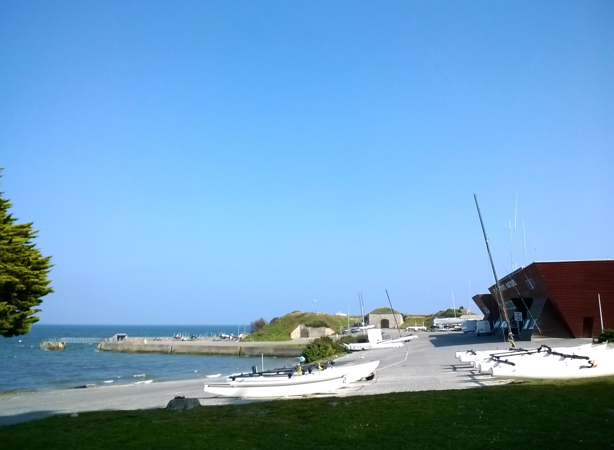 Morbihan Saint-Pierre-Quiberon Ecole Nationale Voile Port 20032016